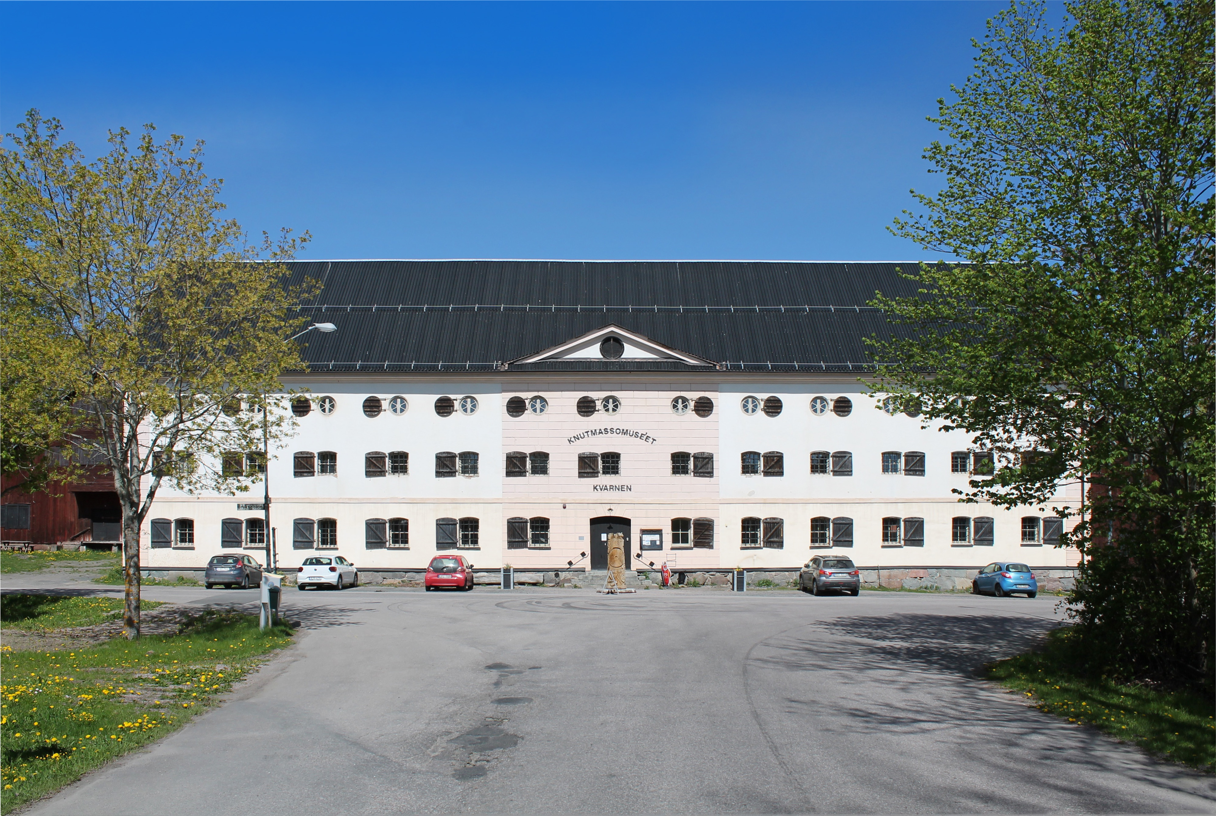 Fasaden på Knutmassomuseet i Gimo. Entré och lite av vägen.